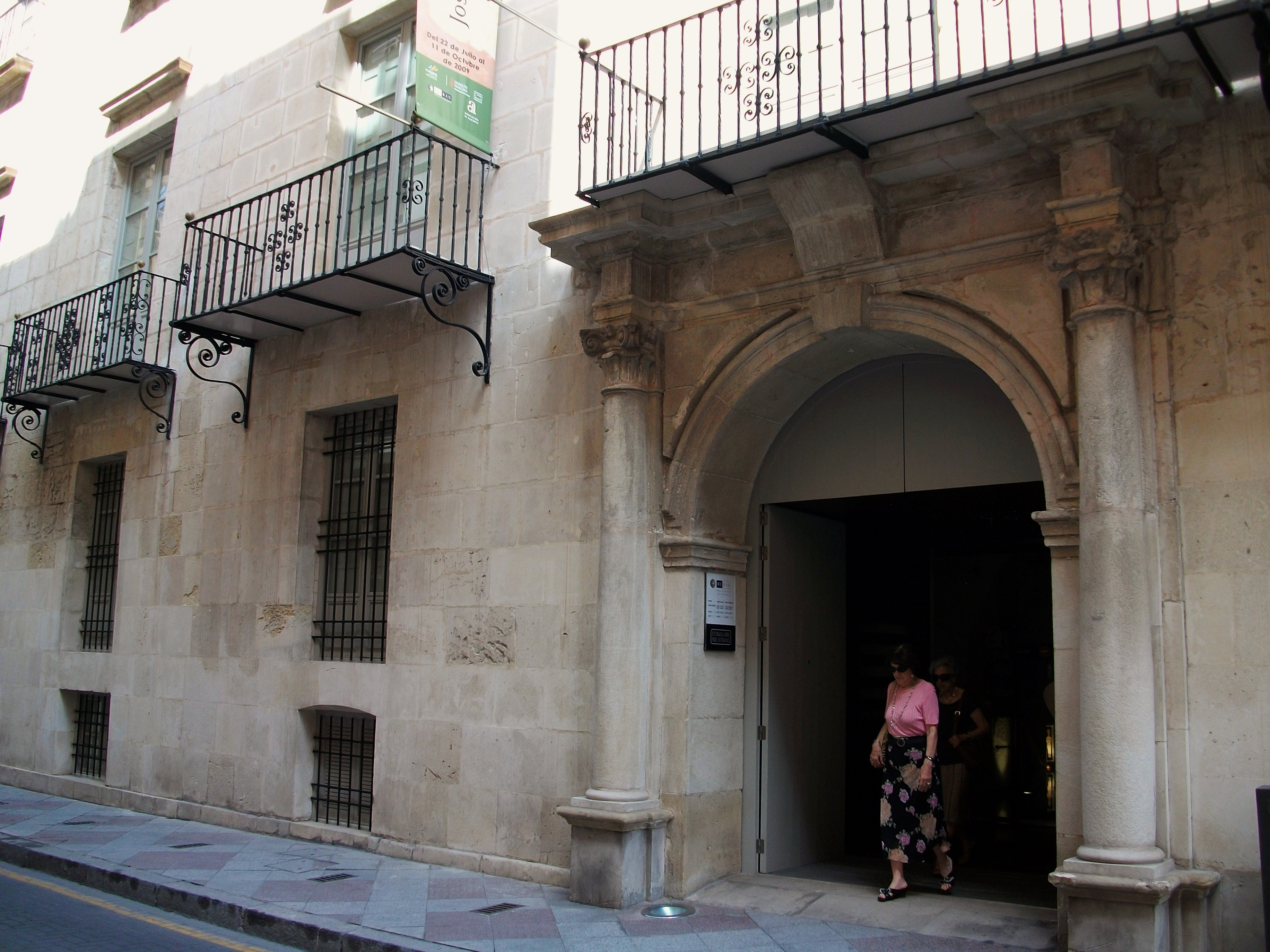 Entrada al Museu de Belles Arts Gravina.